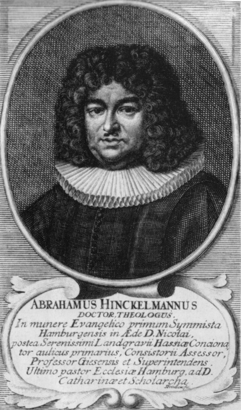 Abraham Hinckelmann (1652-1695), deutscher Theologe